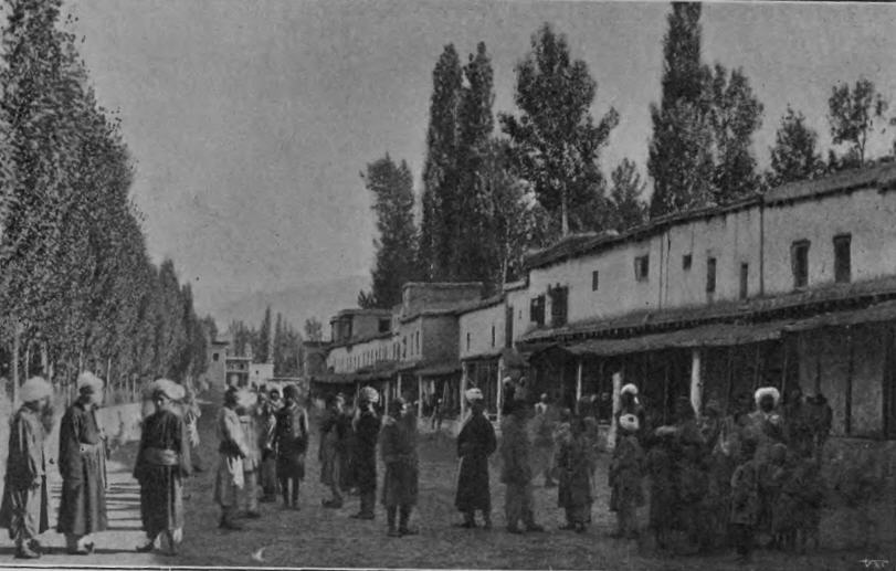 Leh